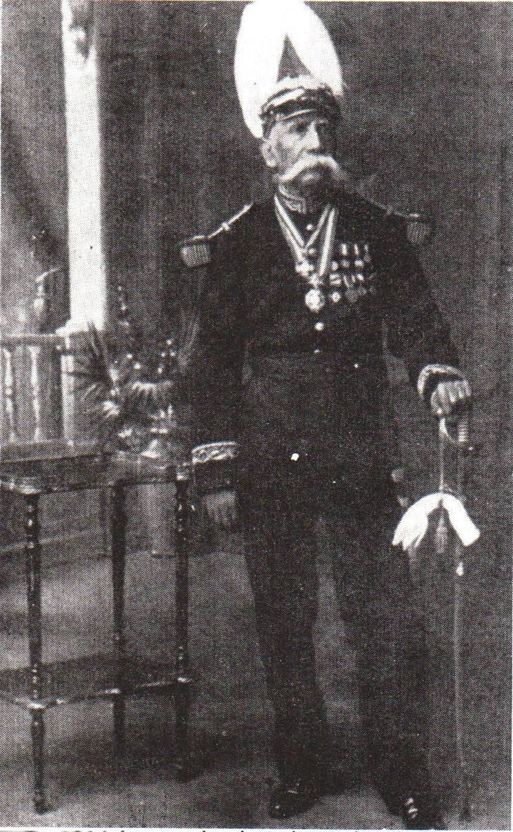 General Higinio Aguilar